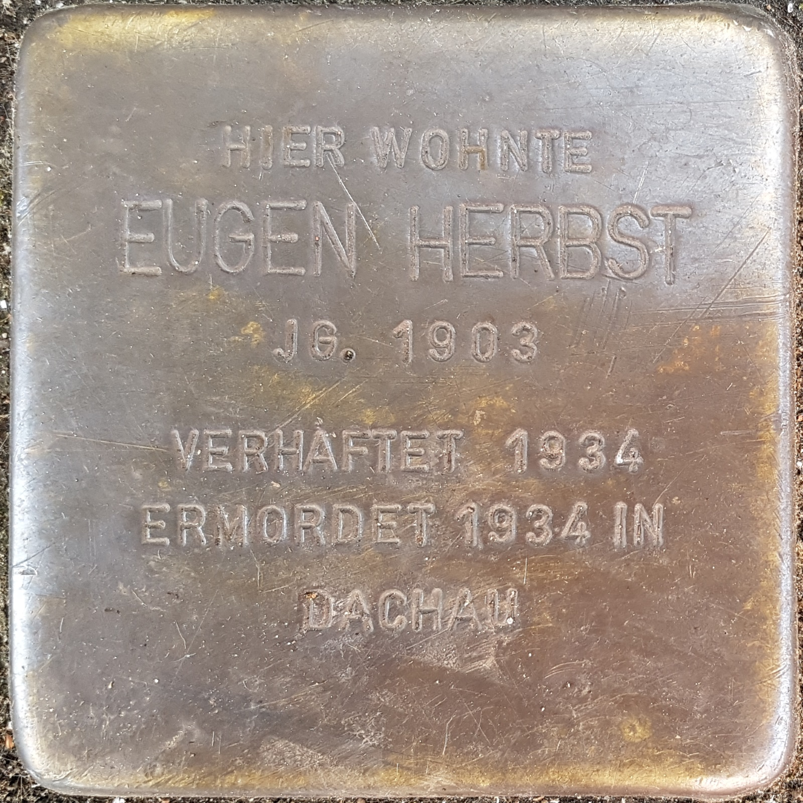 Stolperstein Eugen Herbst vor dem Haus Maxstraße 65 in Ludwigshafen (Rhein)